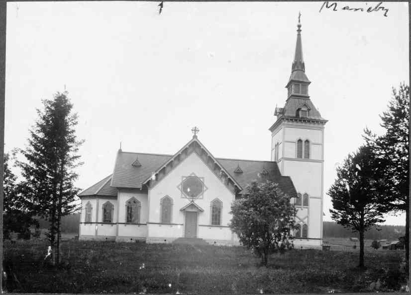 Kyrkan från norr. Kategori: (01) ExteriörerKyrkan från norr.